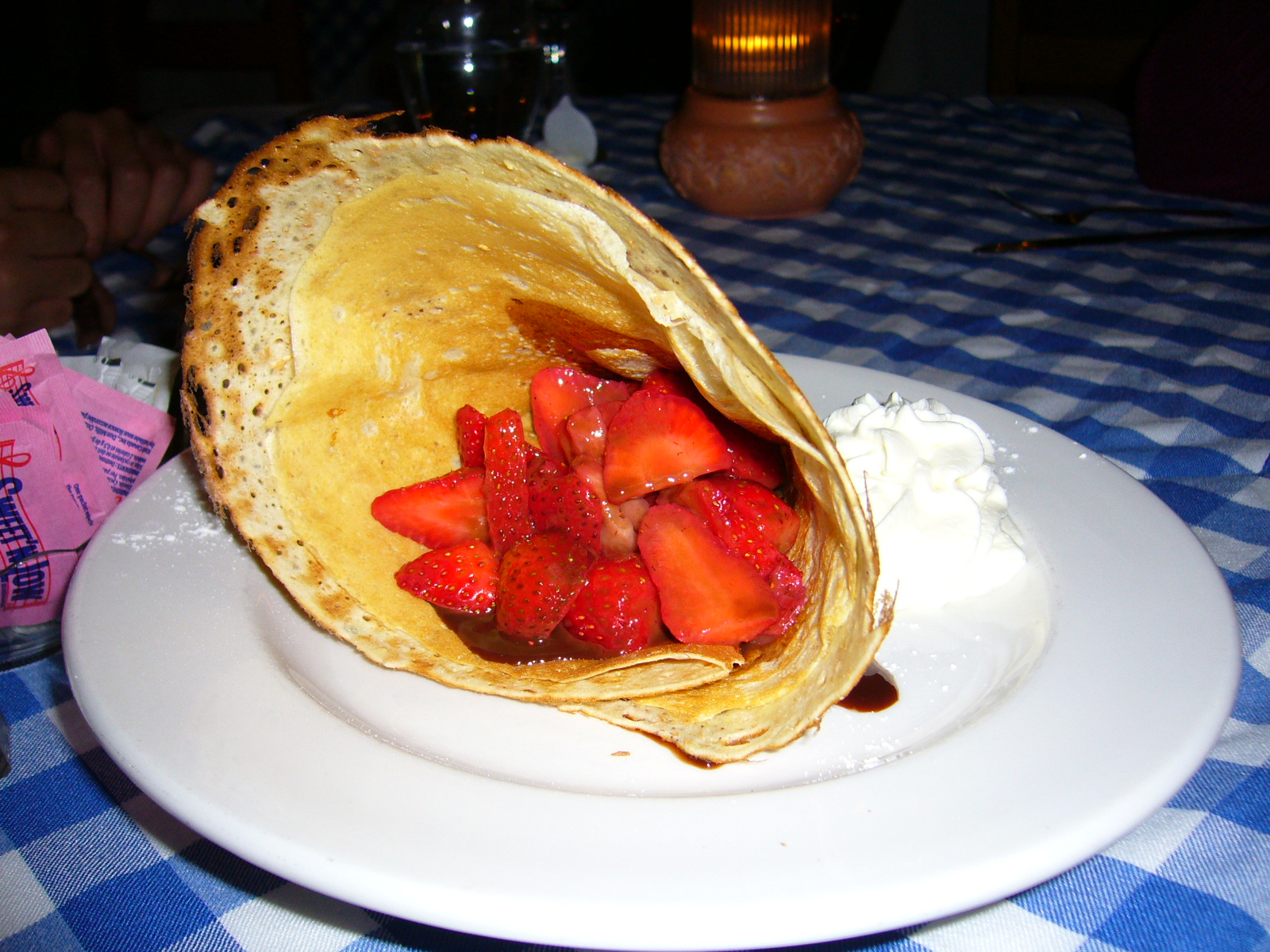 Crêpe